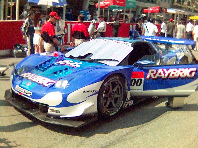 Super GT